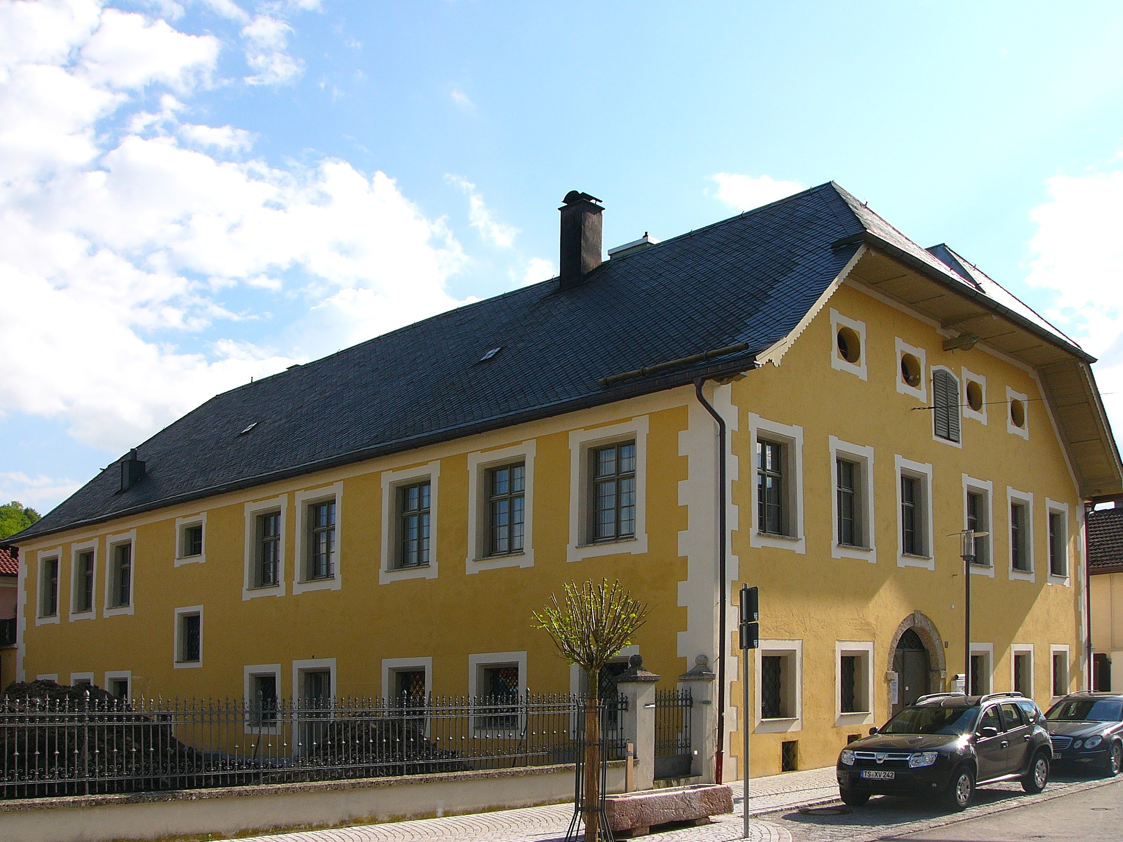 Ehem. Gasthof Schwemmbräu; bis 1816 Salzburgisches Pfleggericht, stattlicher zweigeschossiger Putzbau mit zweigeteiltem Schopfwalmdach, im Kern 16. Jahrhundert, Fassade 17. Jahrhundert.This is a photograph of an architectural monument.